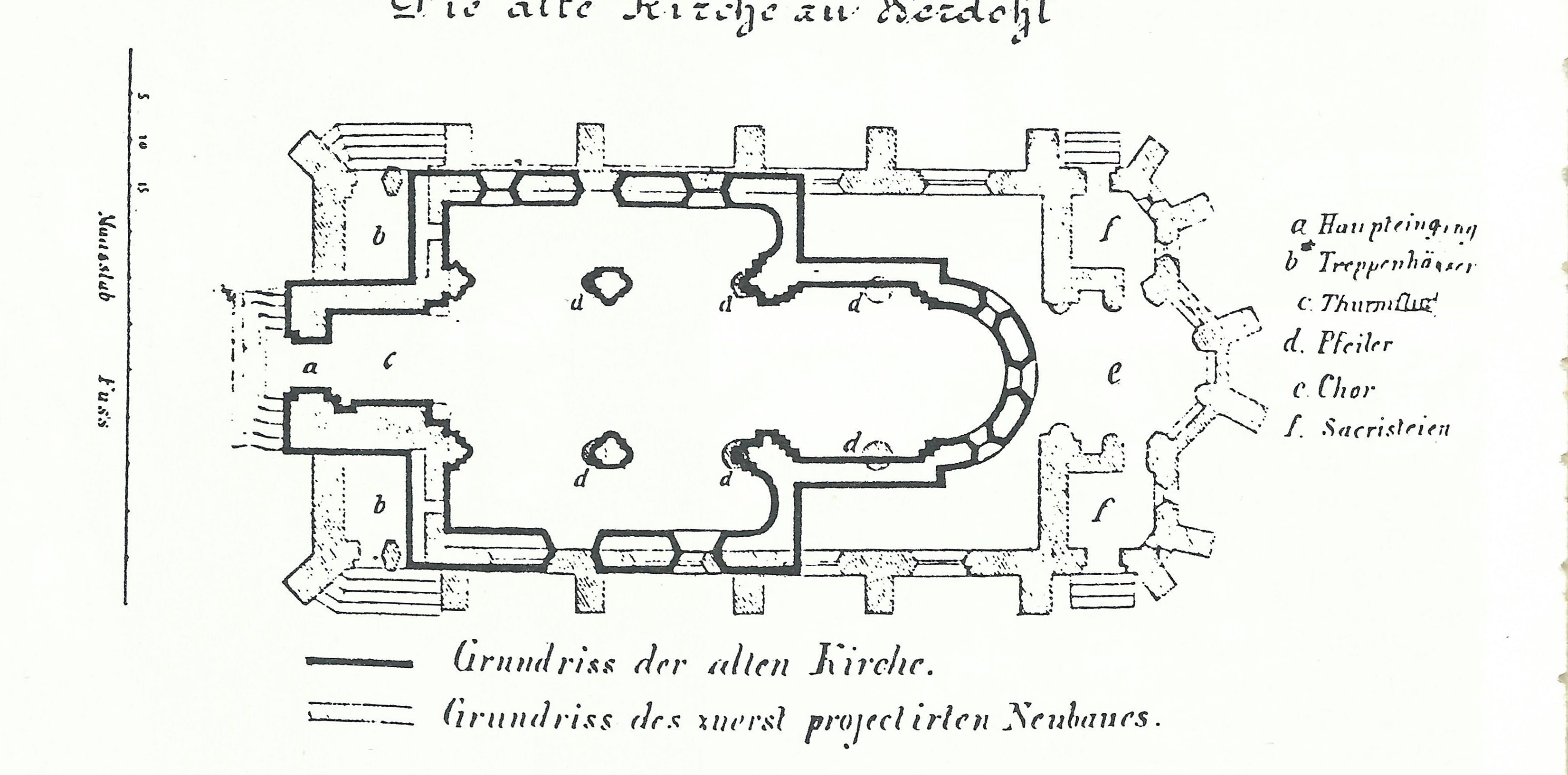 Grundriss der alten Kilianskirche in Werdohl aus der Zeit vor 1847